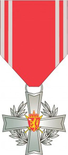 Норвежский Крест Почёта Вооружённых сил